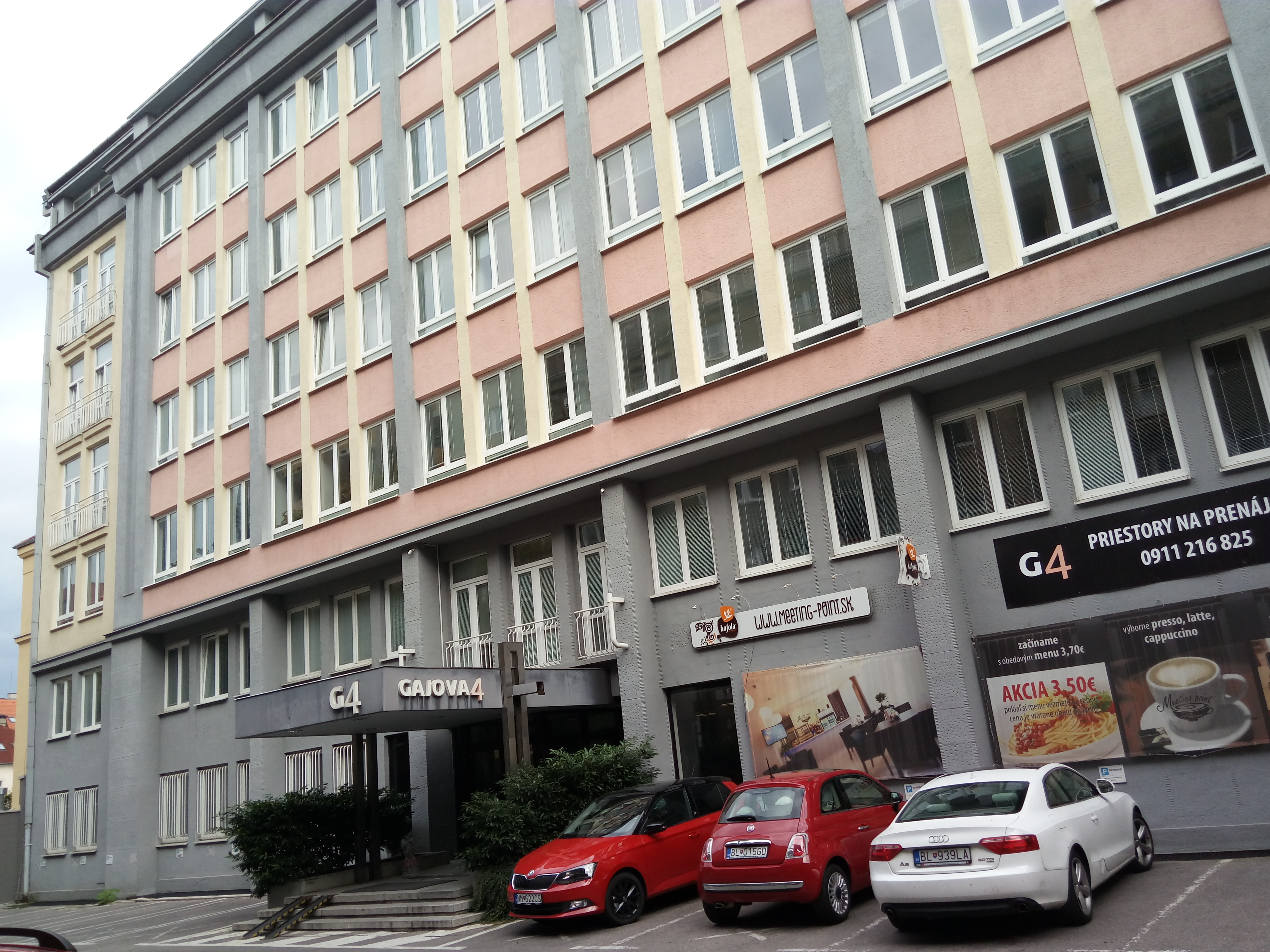 Gajova 4, Staré Mesto, Bratislava